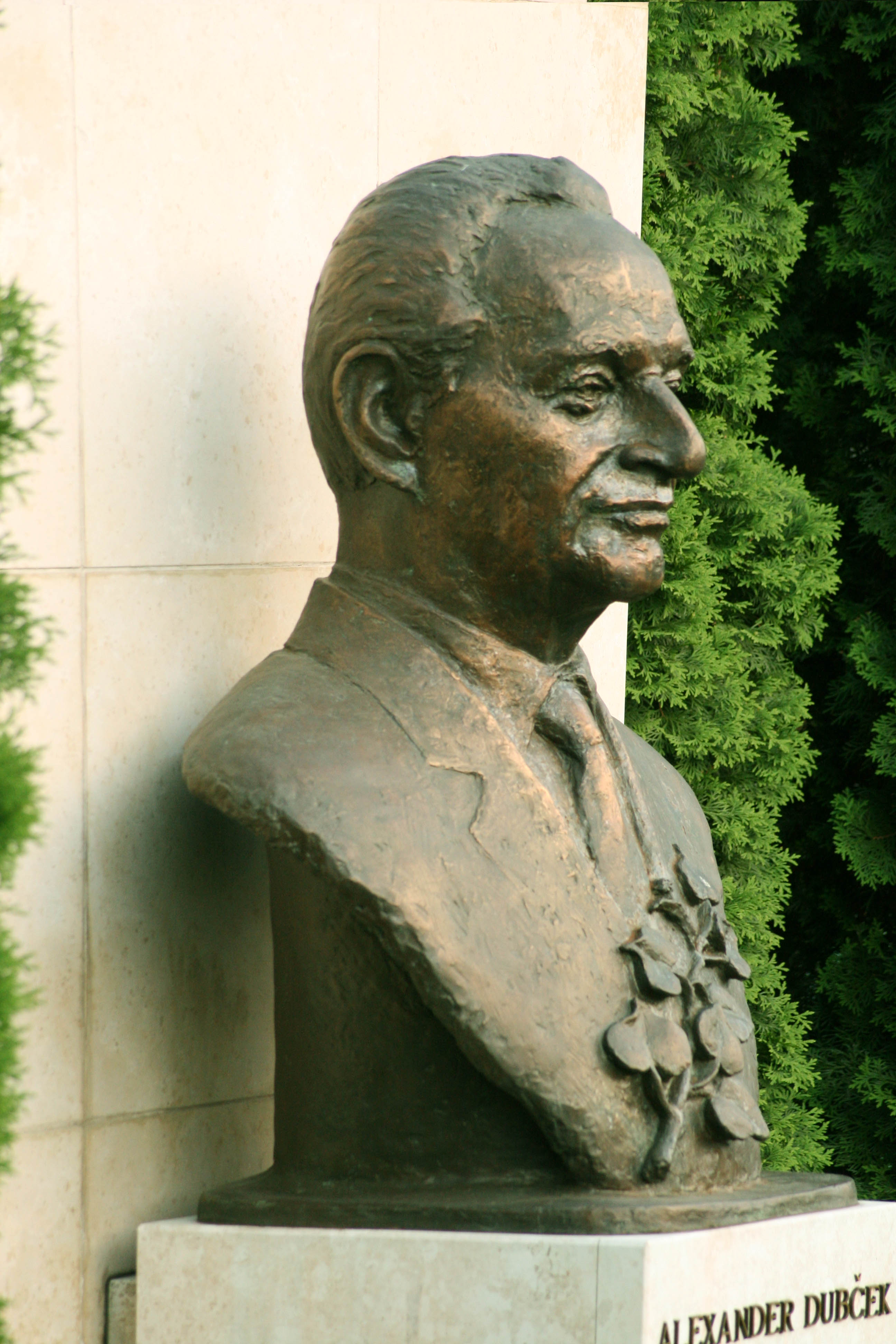 Autorkou busty A. Dubčeka pred budovou národnej rady pri bratislavskom hrade je Ľudmila Cvengrošová